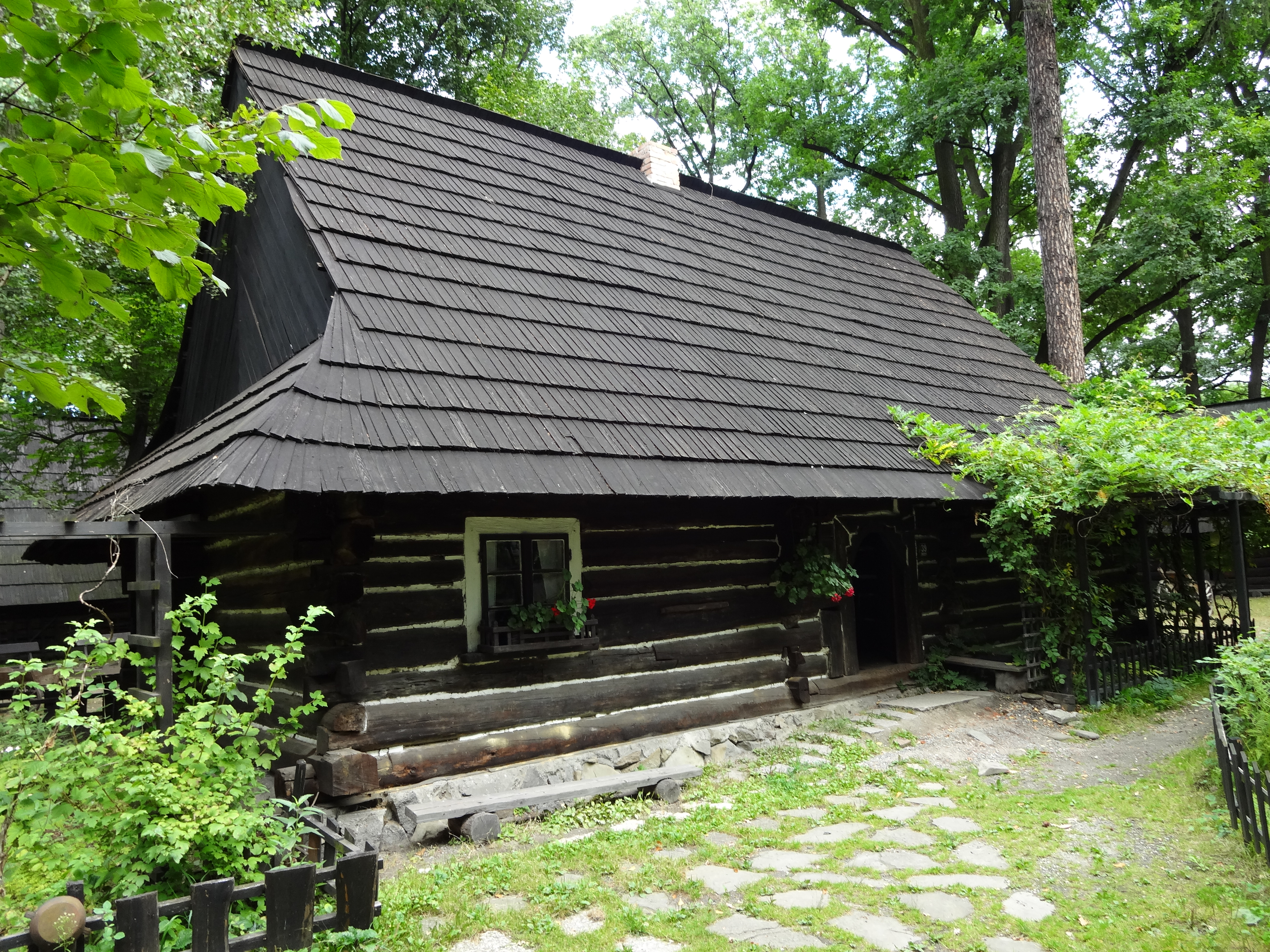 Pszczyna - zabytkowa chałupa w Zagrodzie Wsi Pszczyńskiej (zabytek nr A/1219/76)